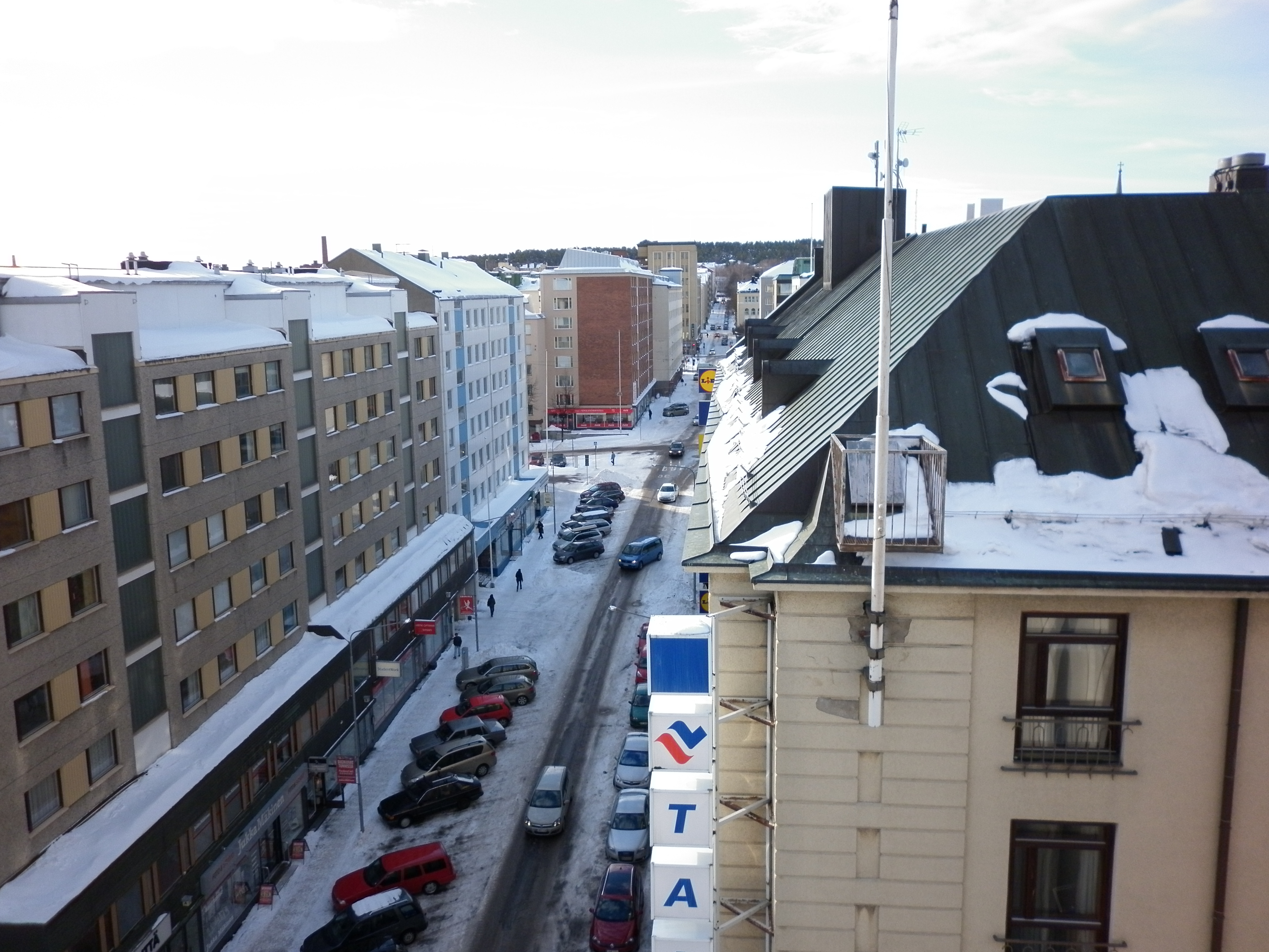 Hallituskatu Pyynikille.JPG